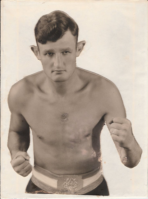 Albert van Bemmel